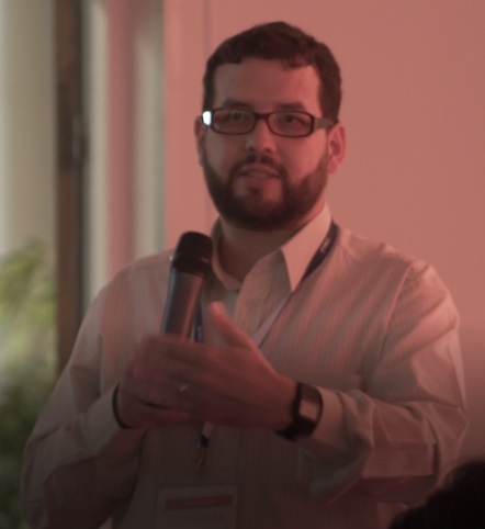 Sébastien Point en conférence en 2017 / Sébastien Point's talk in 2017